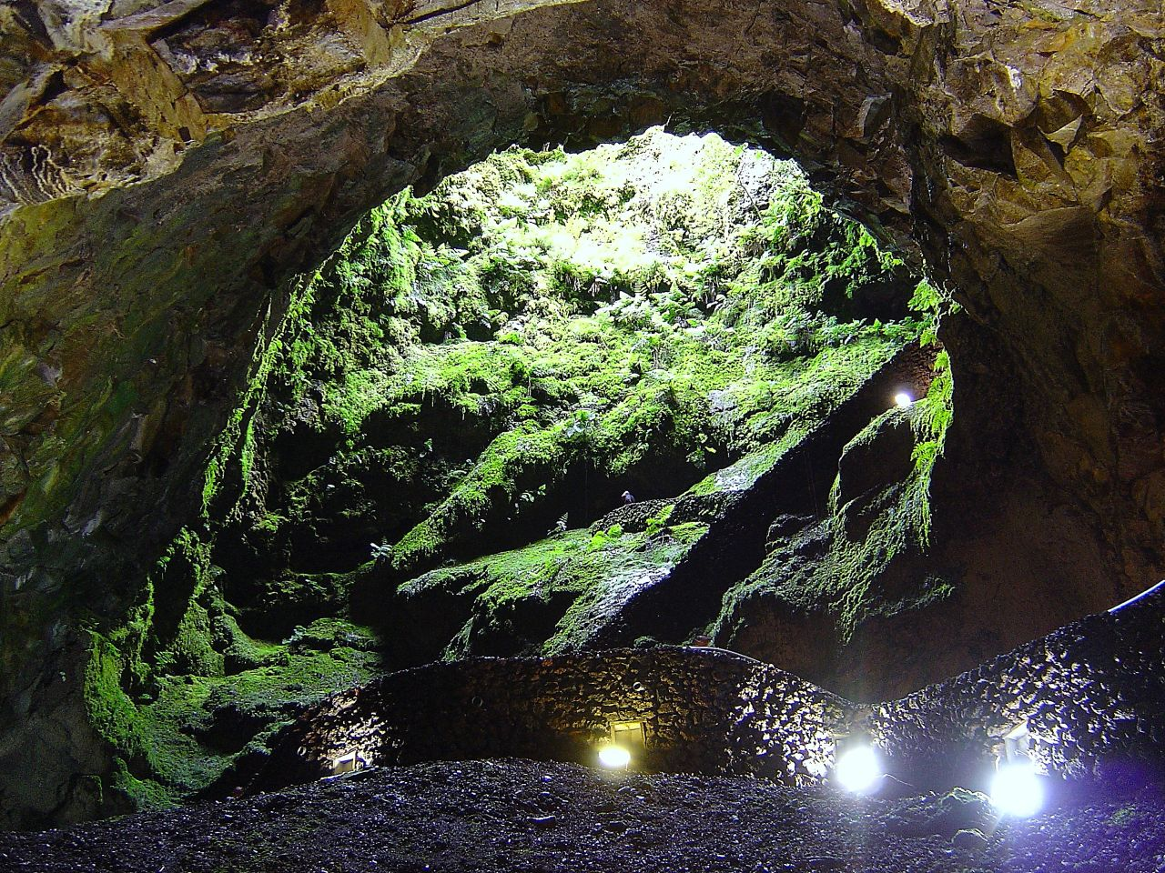 Interior de um vulcão extinto na Ilha Terceira